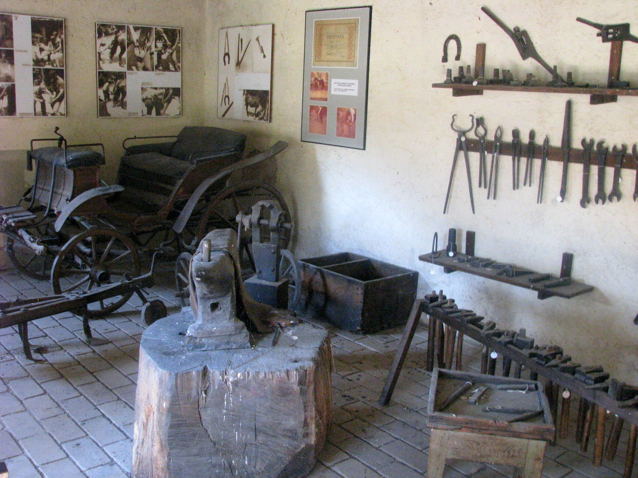 Stqaro selo, open air museum, Kumrovec, Croatia